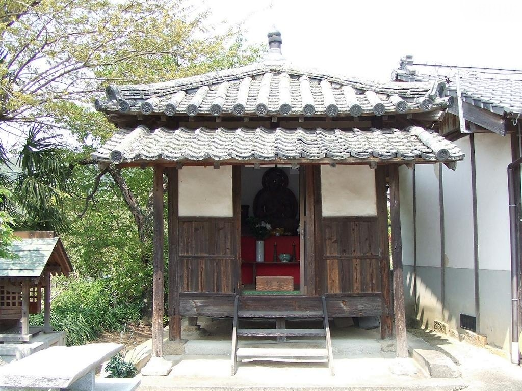 東円坊の大通智勝如来堂